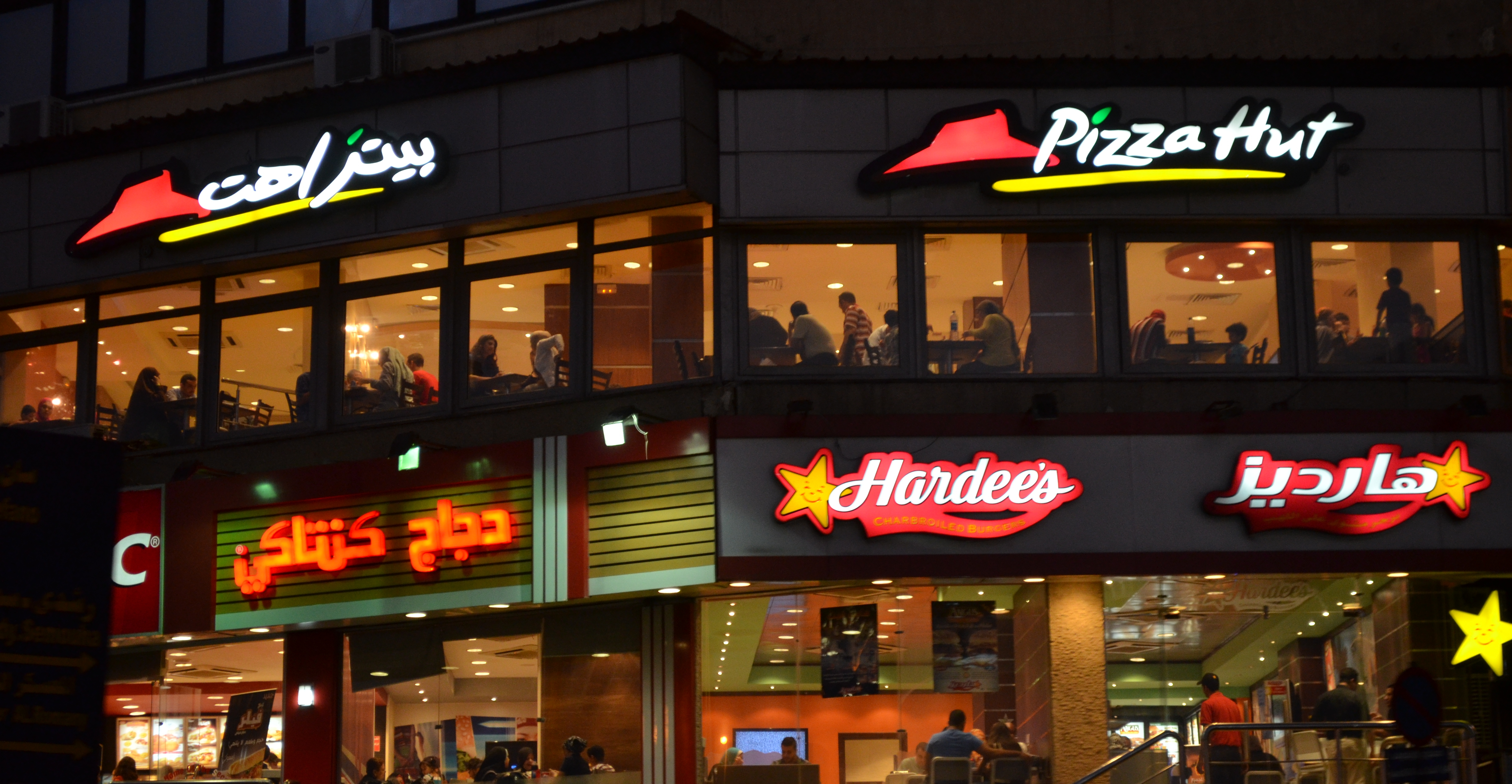 مطاعم بيتزا هت وهارديز ودجاج كنتاكي بالإسكندرية